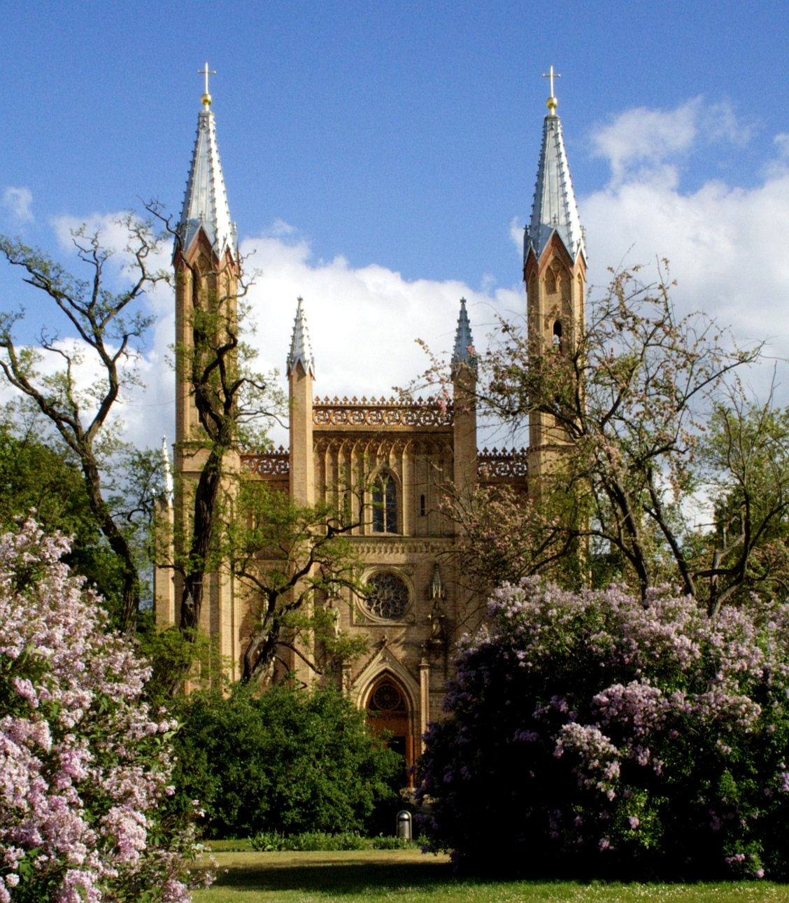 Front der Schlosskirche Neustrelitz